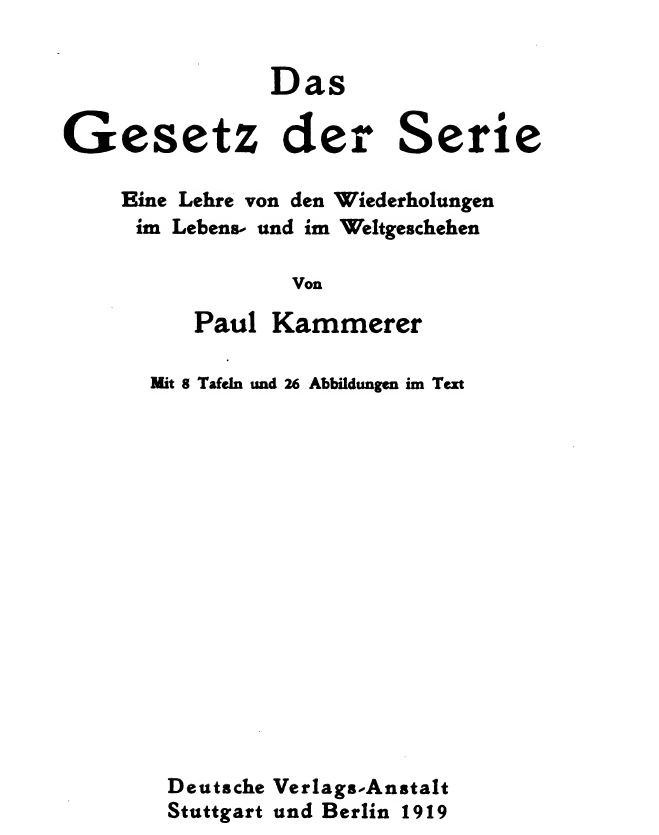 Jedná se o obal knížky P.Kammerera Das Gesetz der Serie z roku 1919